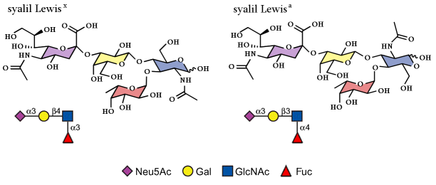 Estructura general dels Sialil-Lewis